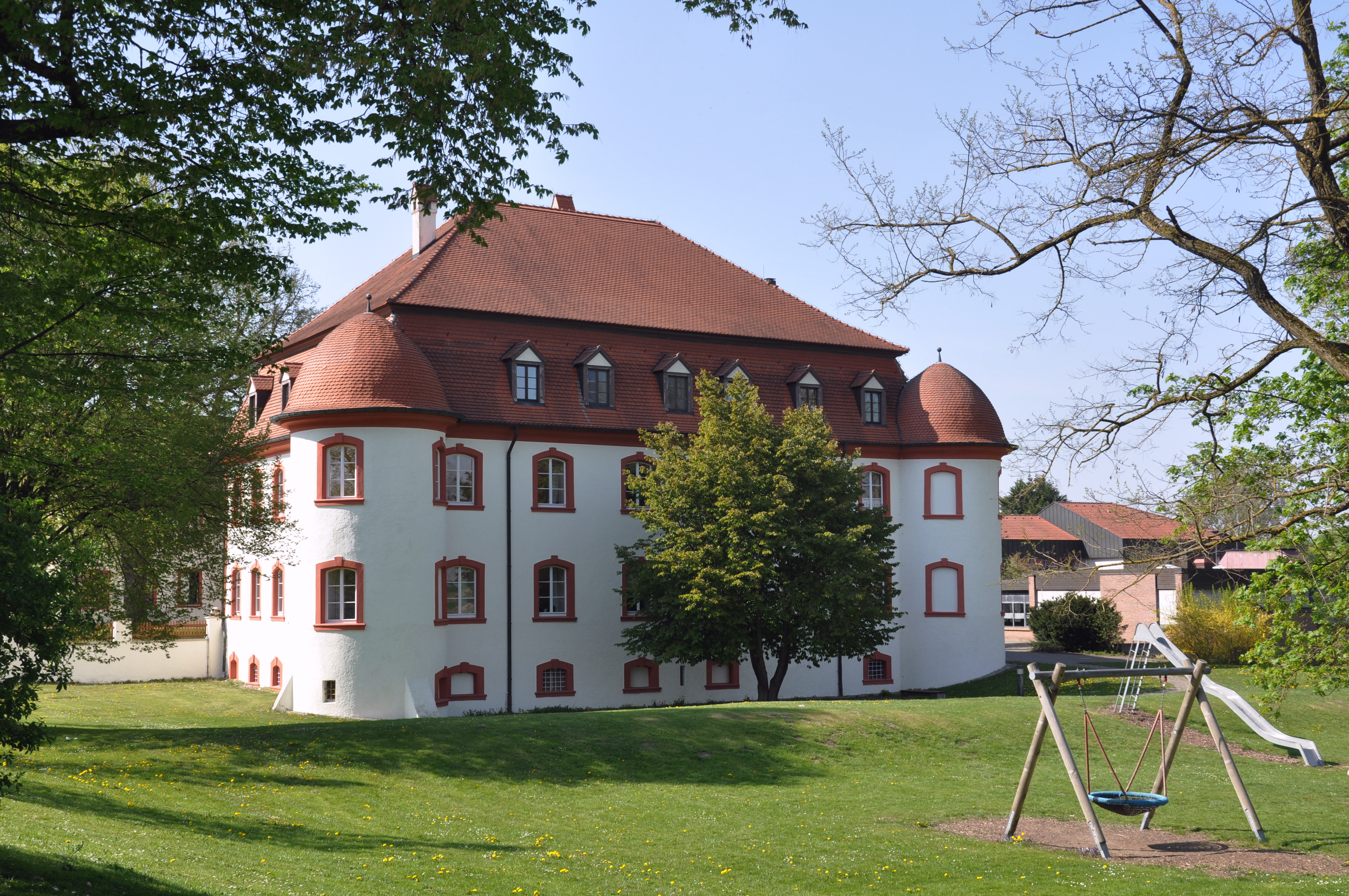 Heudorf am Bussen, Gemeinde Dürmentingen, Schloss Heudorf